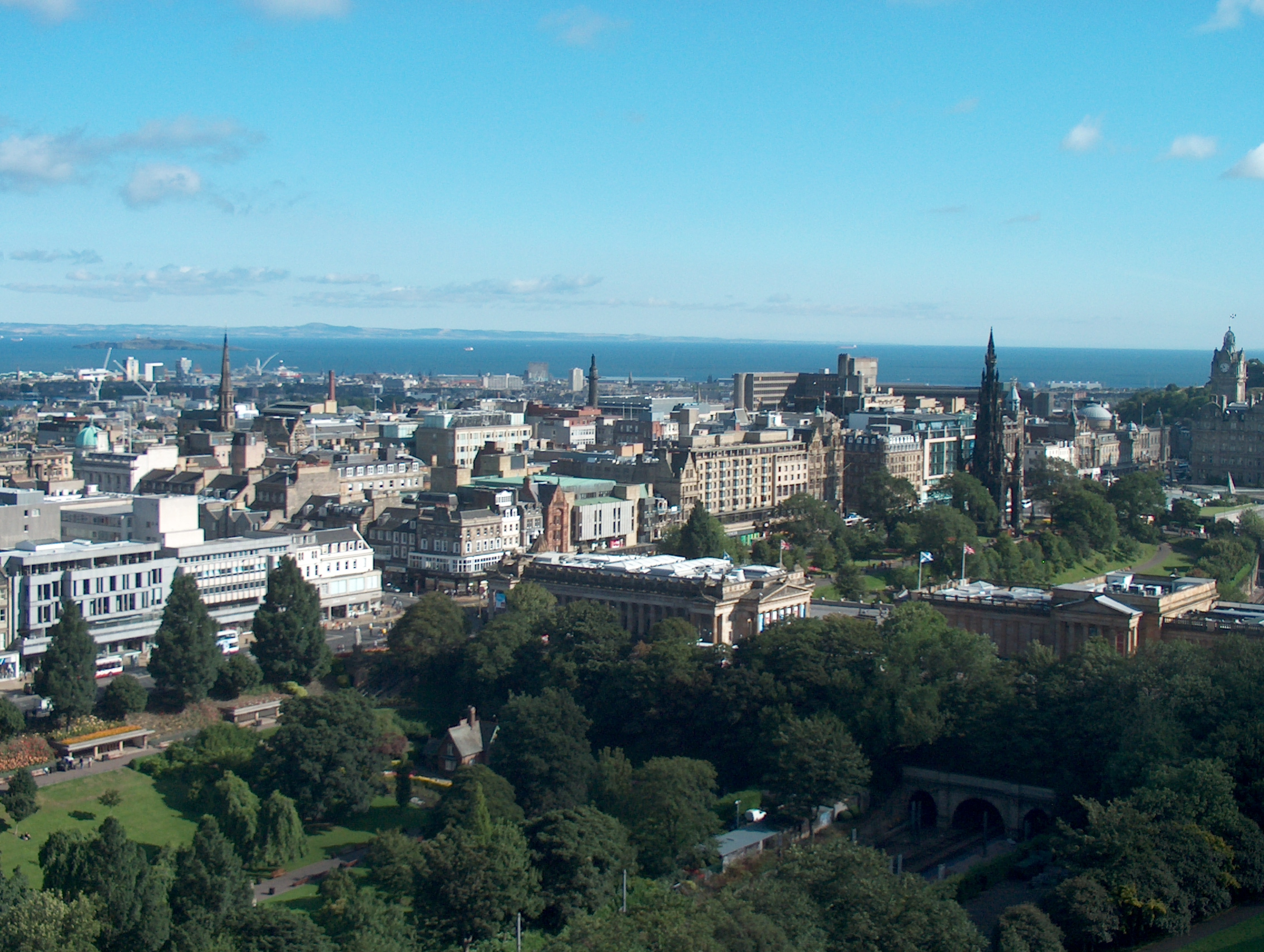 Blick von der Burg auf die Stadt Edinburgh.